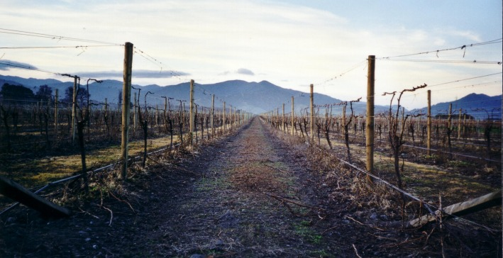 Vineyard near Blenheim, New Zealand.